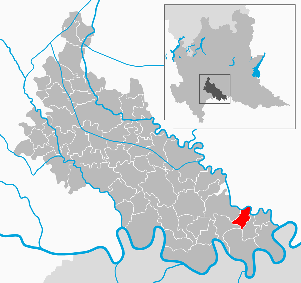 Il comune di Cornovecchio nella provincia di Lodi